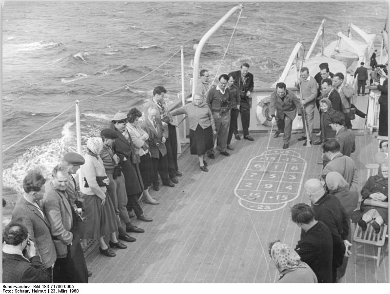 Zentralbild Schaar-23.3.1960 Erste Fahrt des FDGB-Urlauberschiffes "Völkerfreundschaft". Ende Februar 1960 startete das erste FDGB-Urlauberschiff "Völkerfreundschaft" zu einer 27tägigen Ferienreise von Rostock aus ins Mittel- und Schwarze Meer. UBz: Urlauber beim Scheffelbord-Spiel.